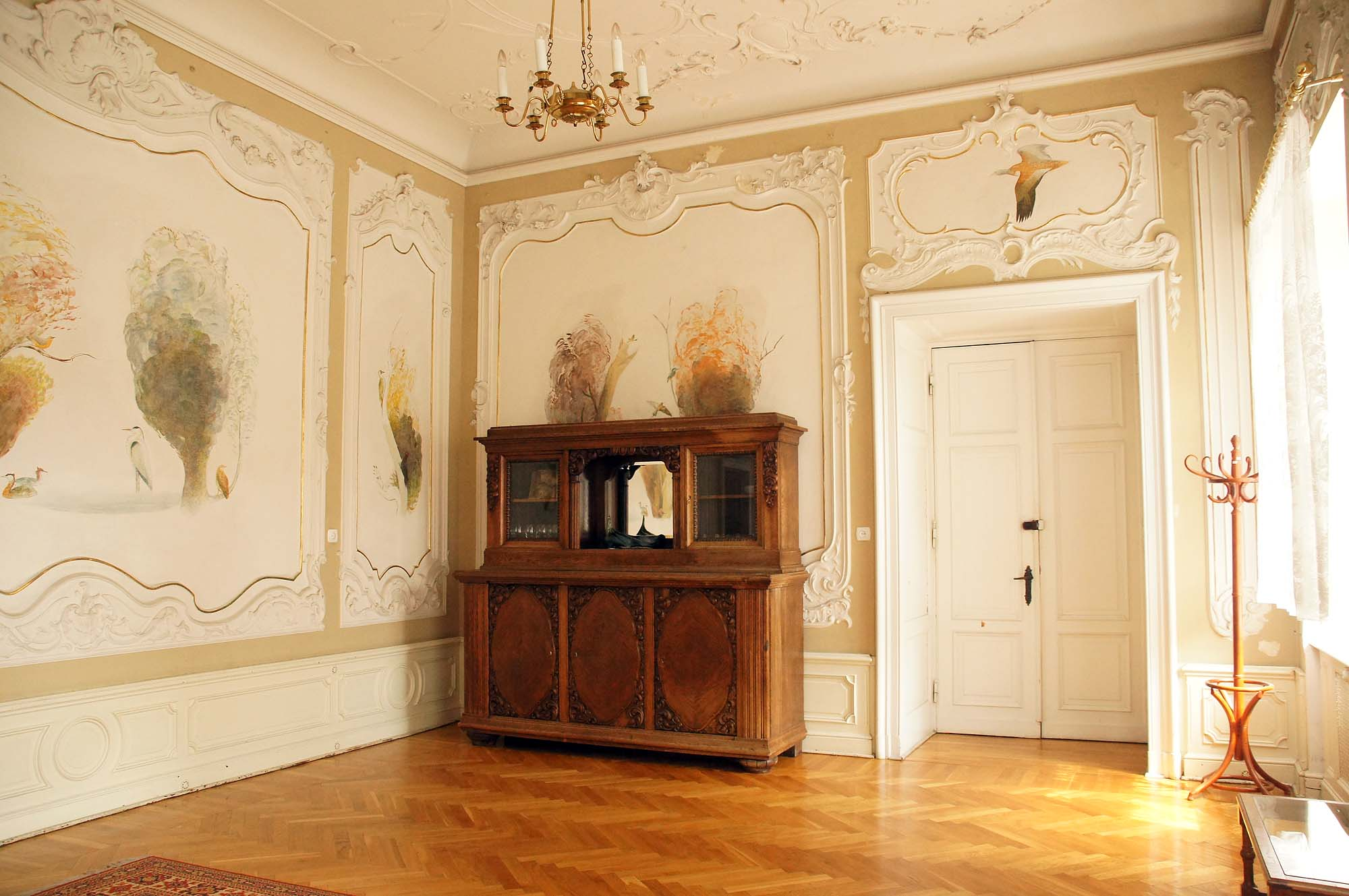 Moszna, zespół pałacowy, XVIII, XX